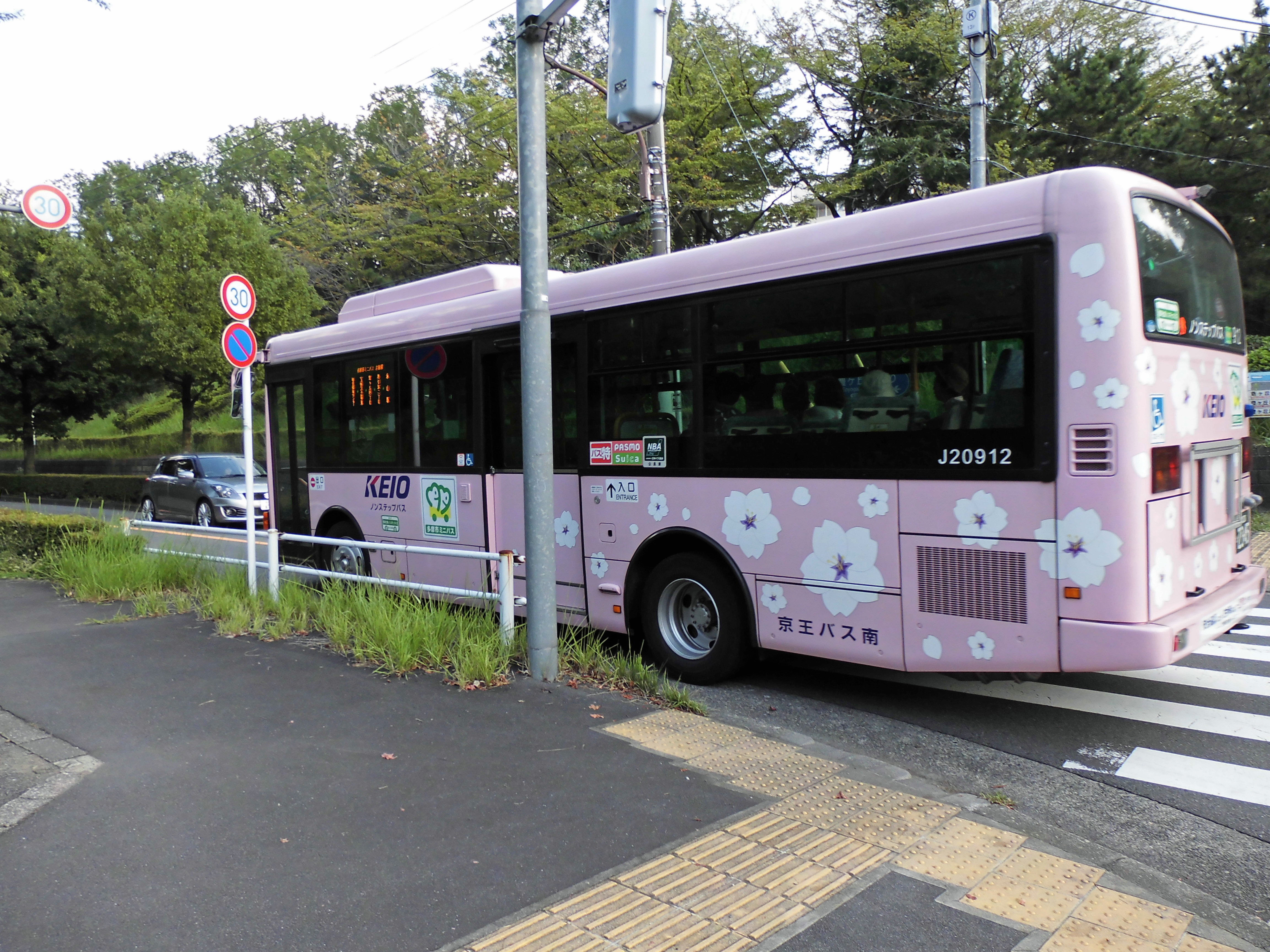 多摩市ミニバス130914